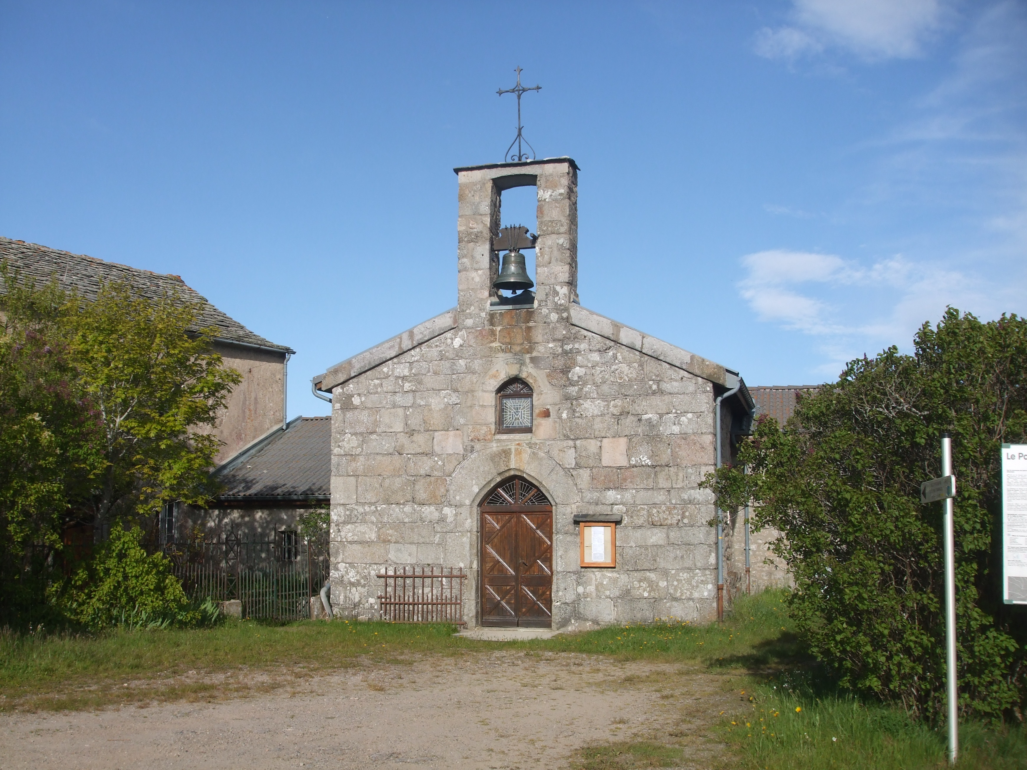 église Sainte Marie du Pouzat